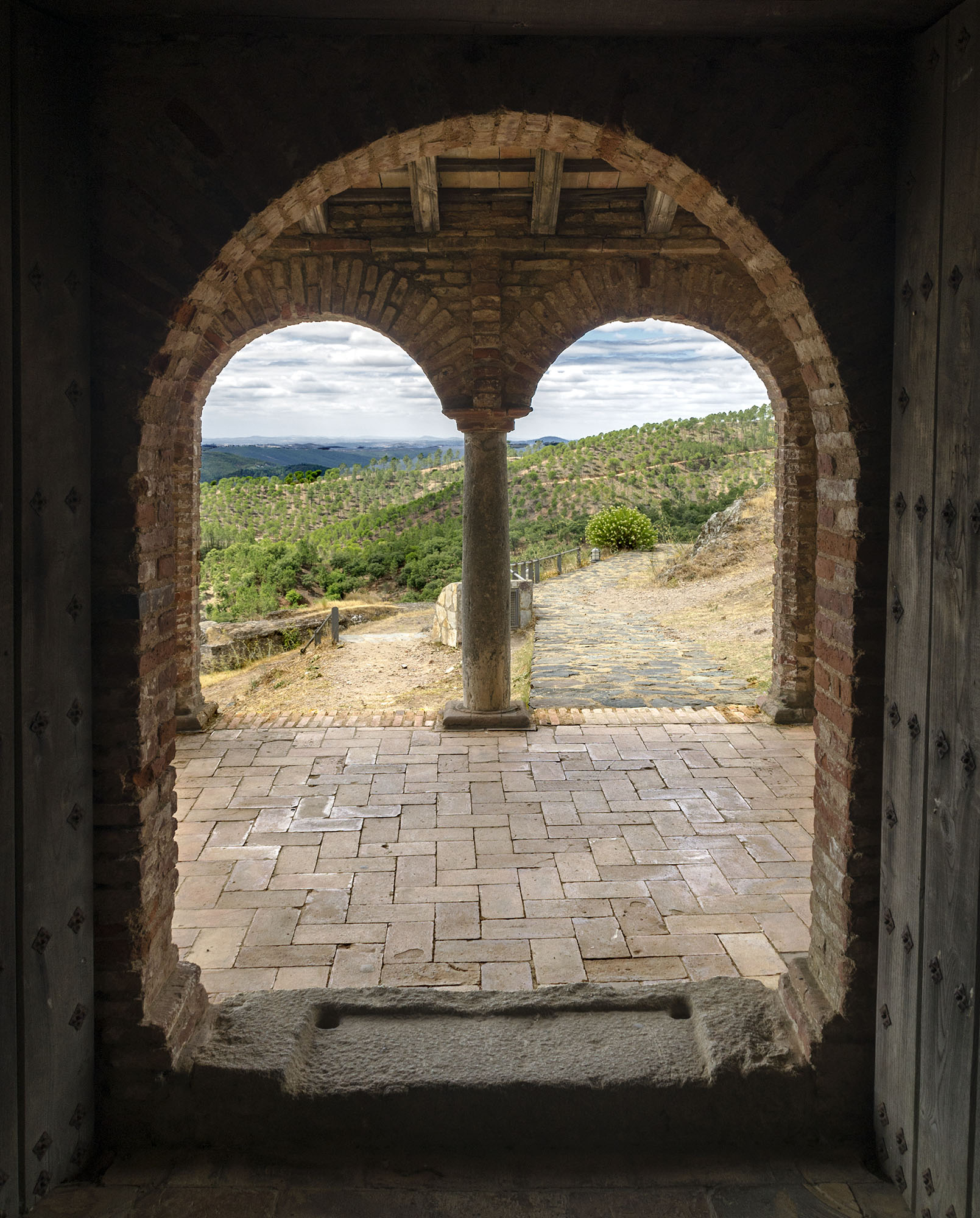 Vista desde el interior a través de la puerta que da al pórtico mudéjar (s. XV)